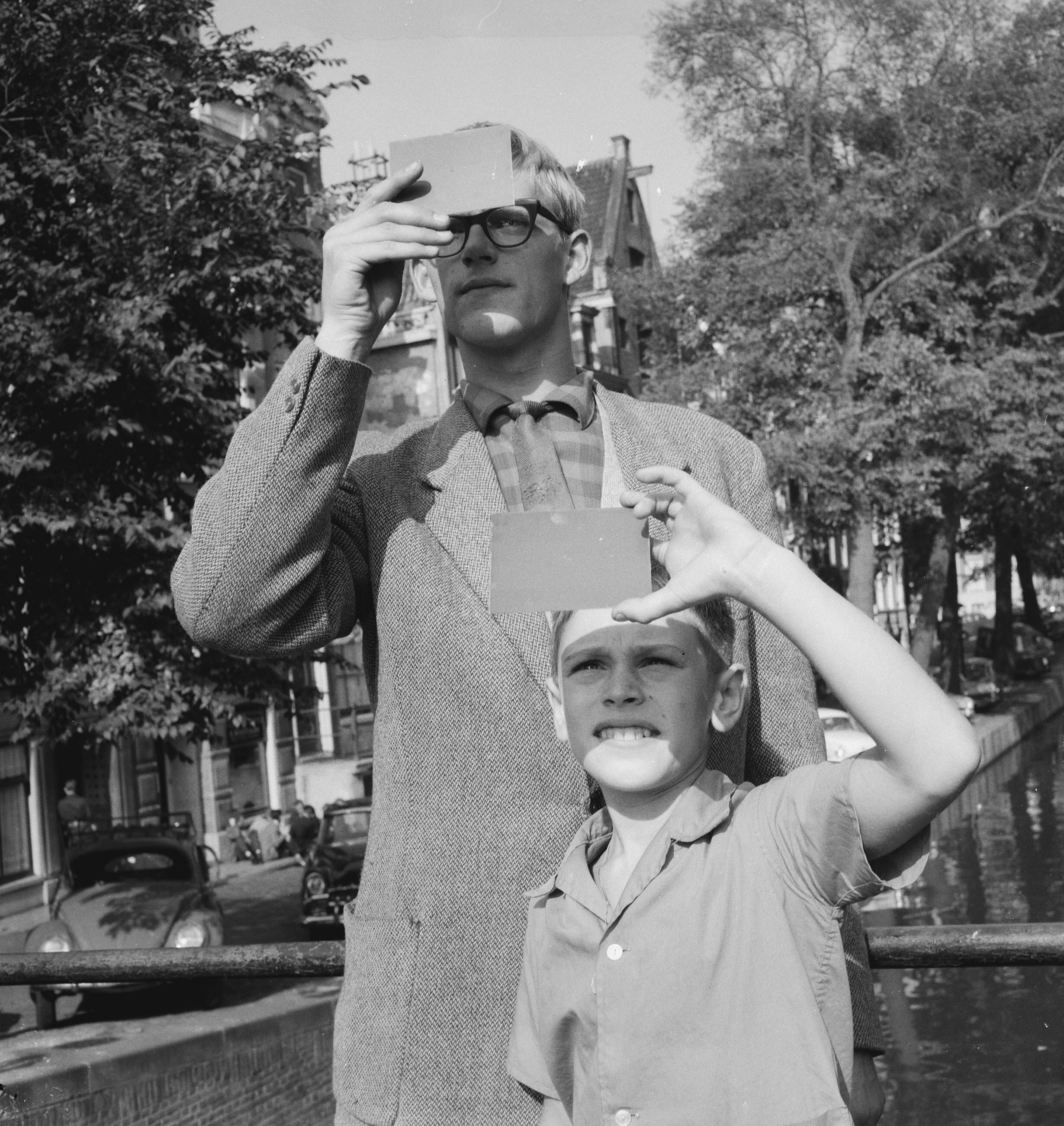 Collectie / Archief : Fotocollectie Anefo Reportage / Serie : [ onbekend ] Beschrijving : Zonsverduistering door glaasje kijken Datum : 2 oktober 1959 Trefwoorden : Zonsverduisteringen Fotograaf : Lindeboom, Henk / Anefo Auteursrechthebbende : Nationaal Archief Materiaalsoort : Negatief (zwart/wit) Nummer archiefinventaris : bekijk toegang 2.24.01.03 Bestanddeelnummer : 910-7218